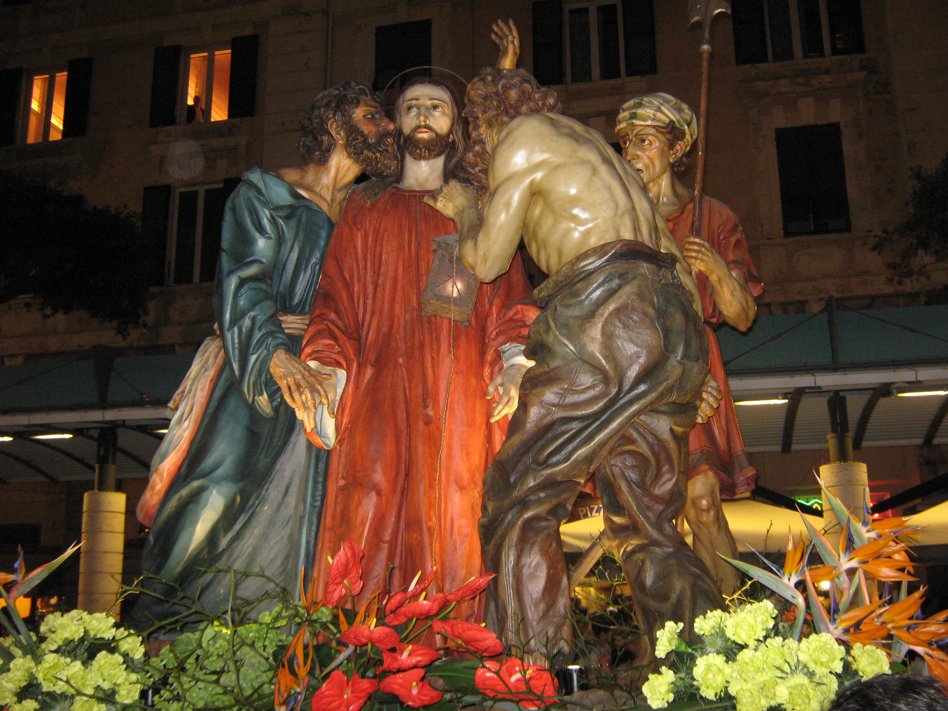 Cassa processionale in legno policromo Il Bacio di Giuda, Giuseppe Runggaldier 1926. Misure 200x160x150cm. Confraternita dei SS. Agostino e Monica. Processione del Venerdì Santo di Savona 2010.